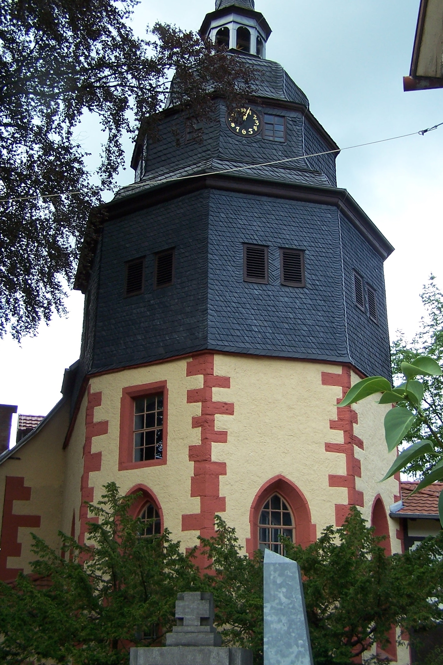 Ansichten und Details zur Kirche.